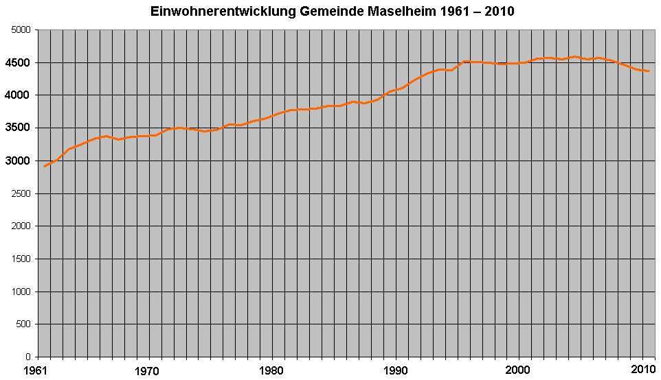 Microsoft Exel-Tabelle zur Einwohnerentwicklung in der Gemeinde Maselheim von 1961 bis 2010.